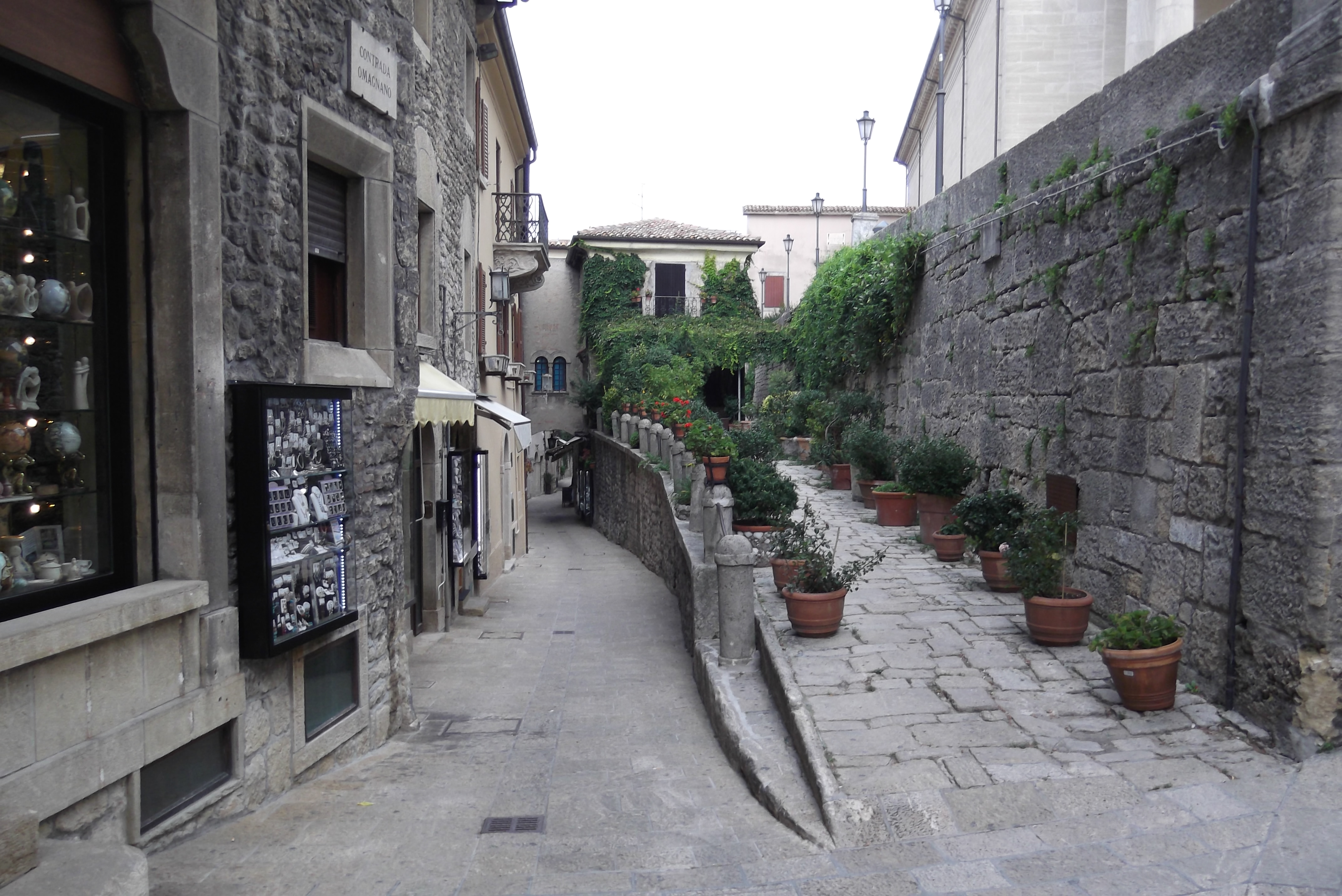 Contrada del Collegio, 40, 47890 Città di San Marino, San Marino